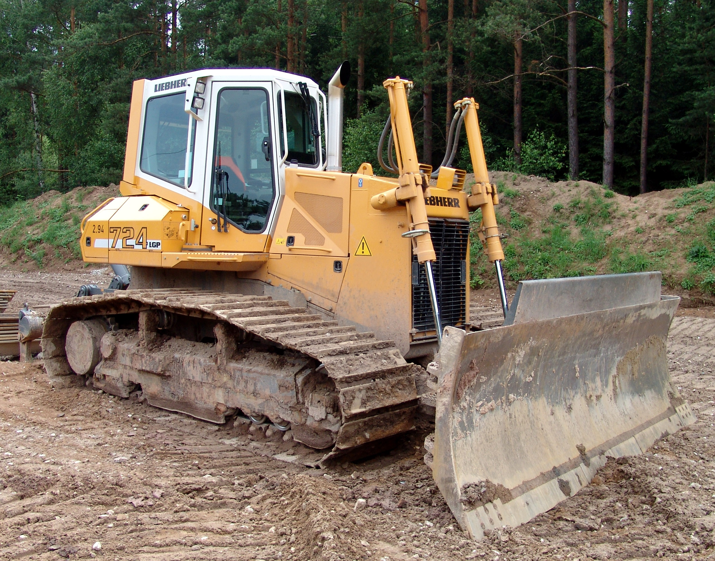 Liebherr 724 Planierraupe